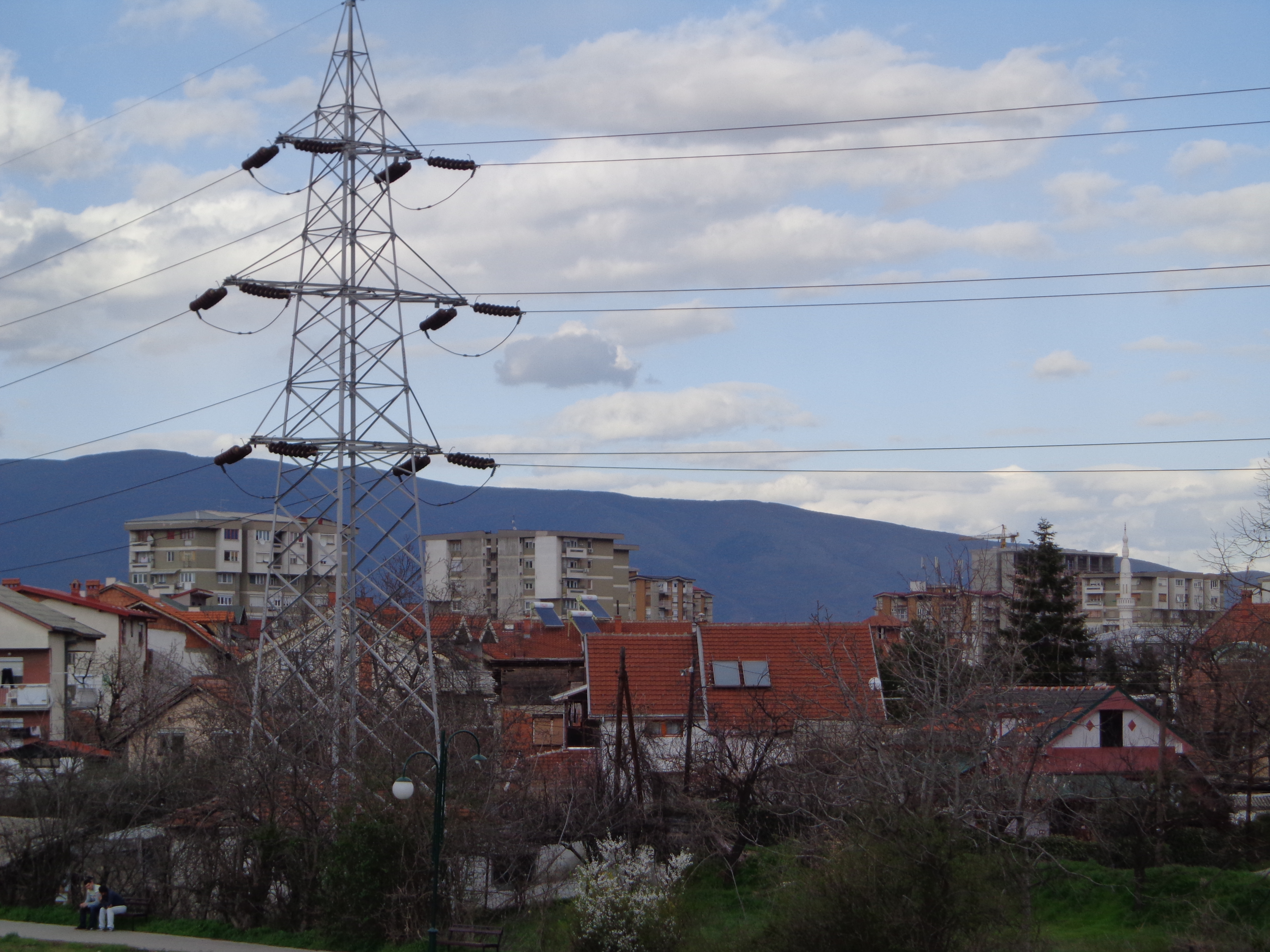 Џамијата во Долно Нерези ( Карпош ) СКОПЈЕ